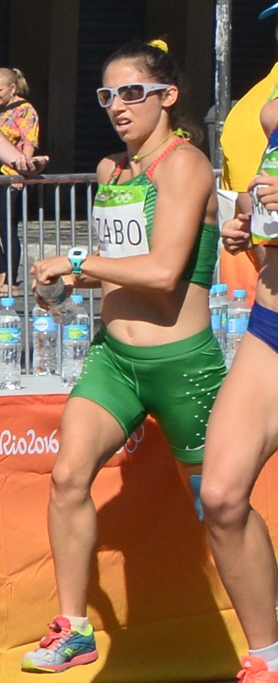 Passage du marathon des jeux olympiques de Rio 2016 dans le centre de Rio